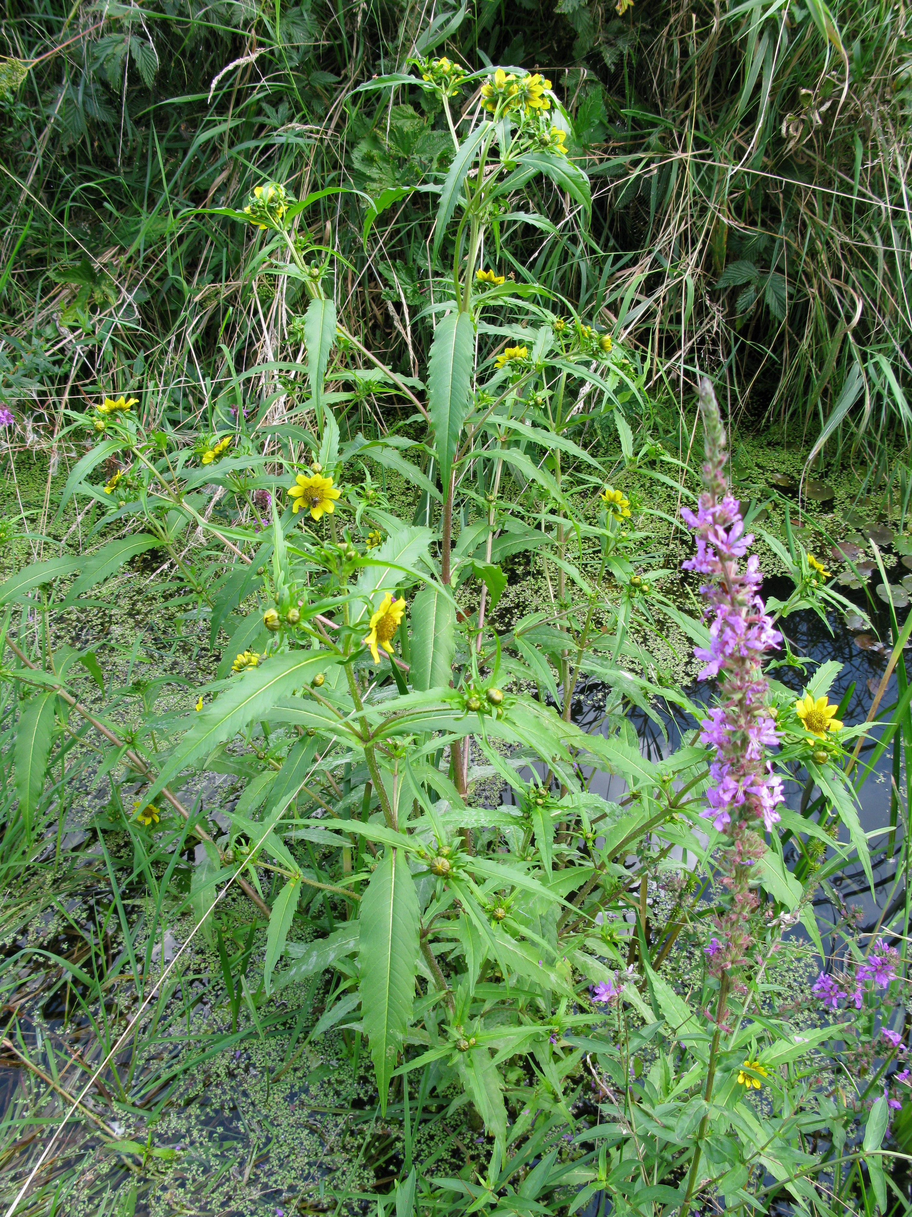 Nickender Zweizahn